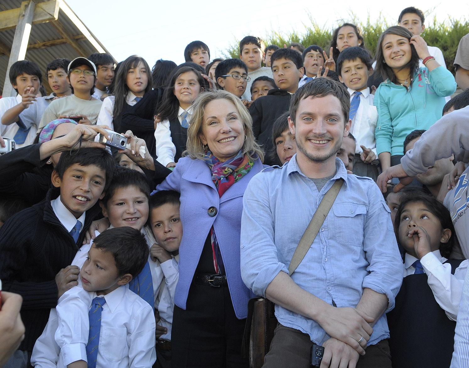 Con Elijah Wood en Curepto